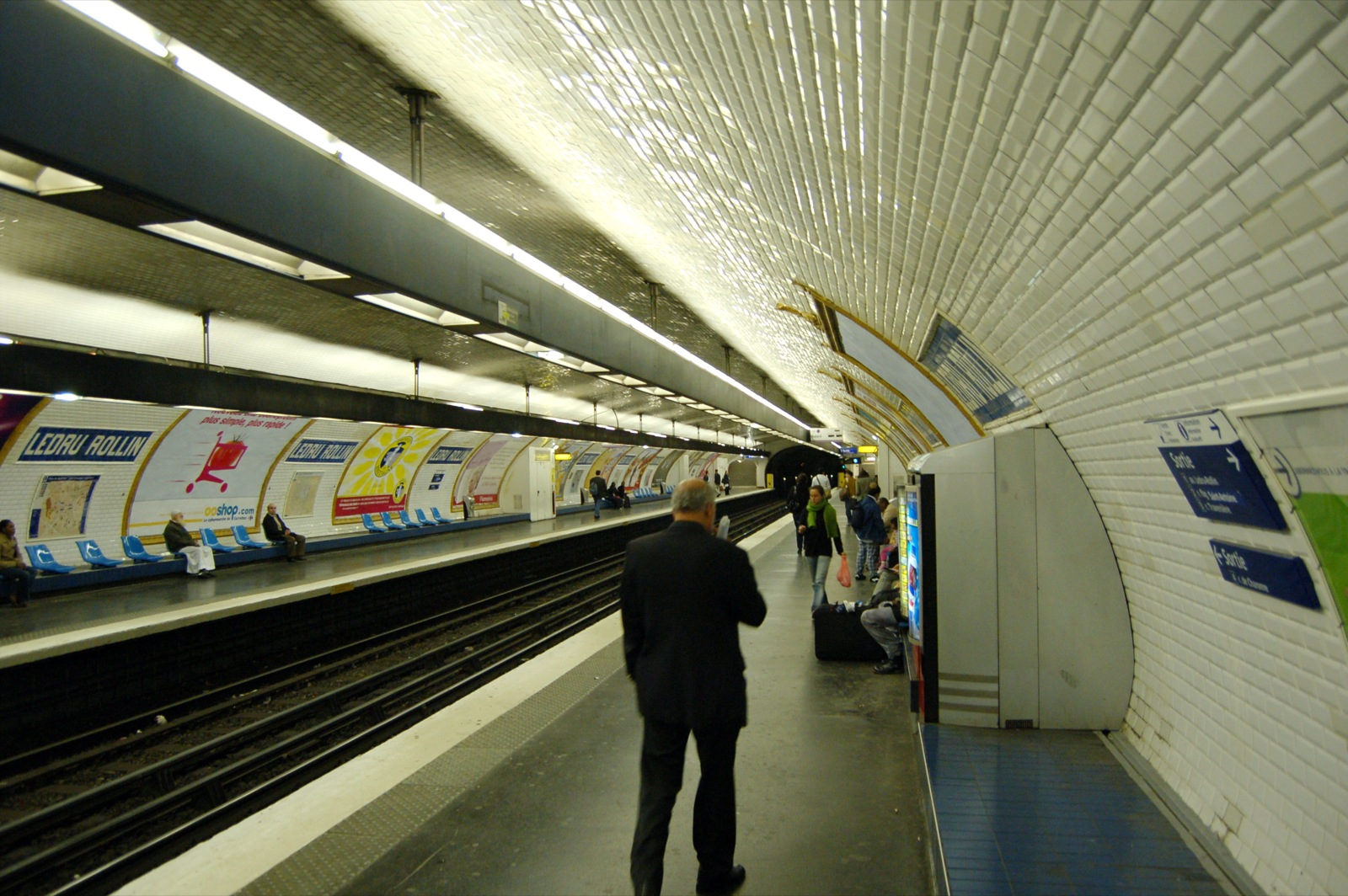 Ledru-Rollin metro station